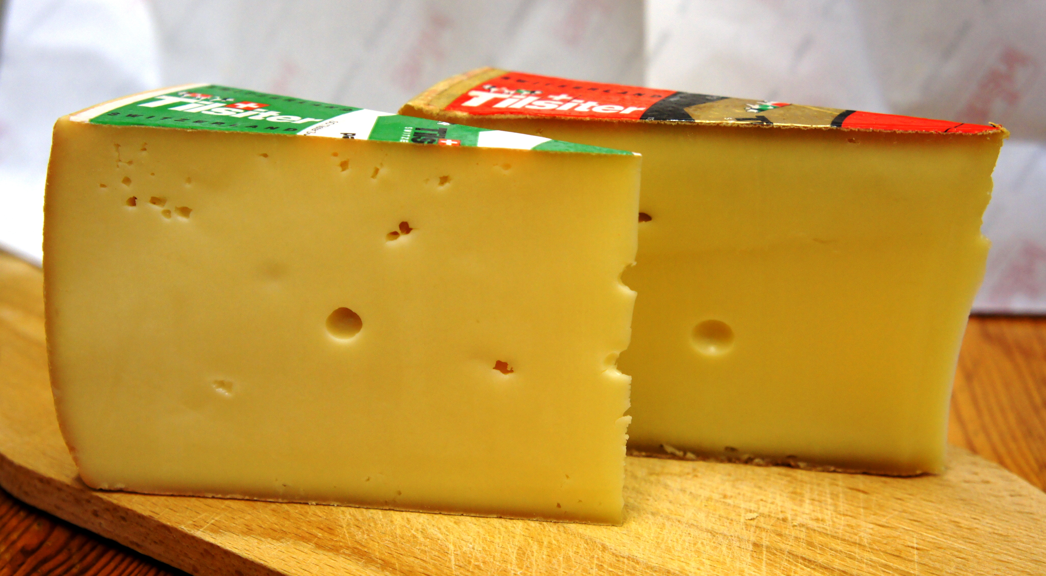 Schweizer Tilsiter grün und rot. Ansicht von der Seite.